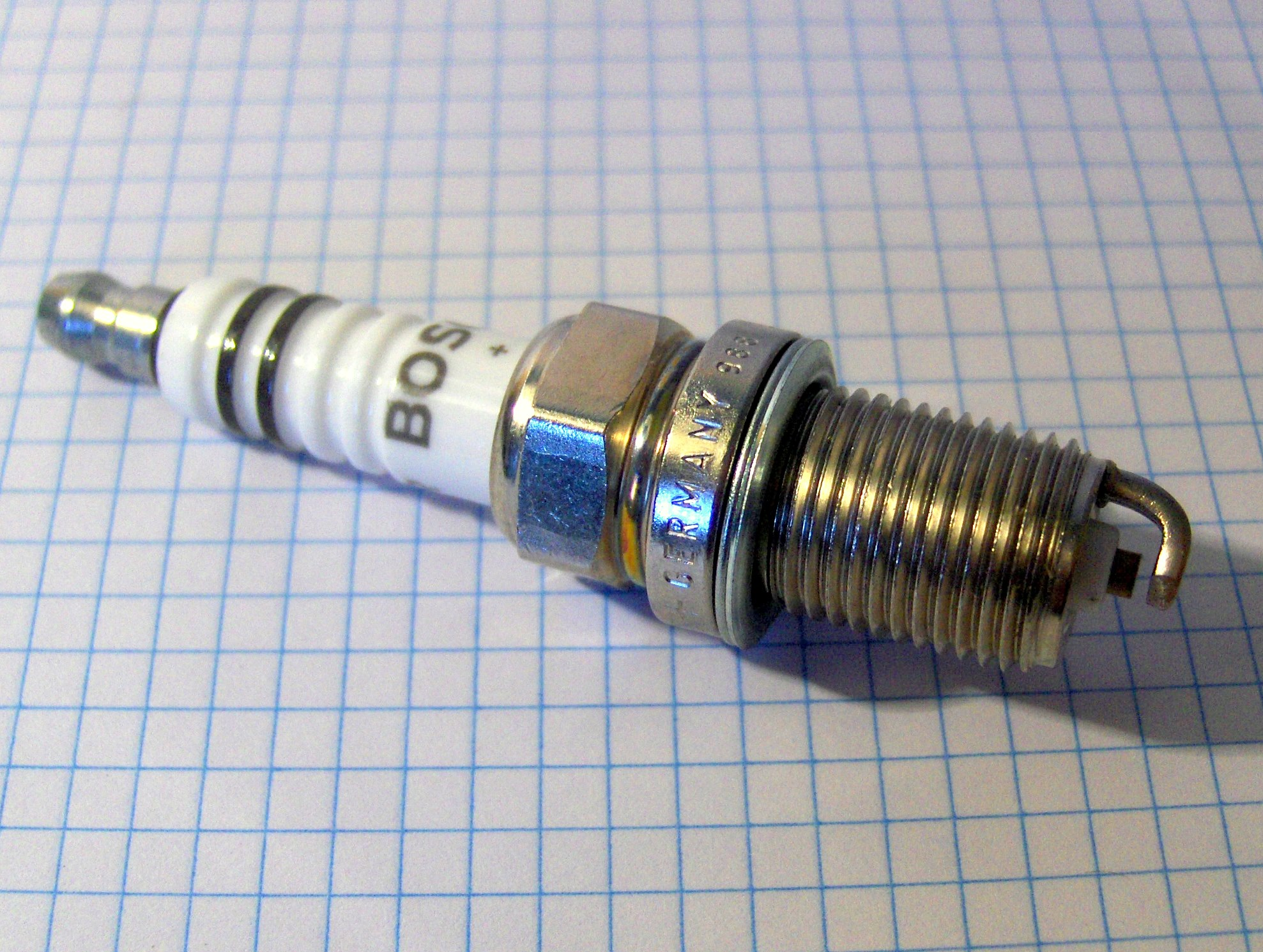 Bujía estándar modelo Bosch Yttrium Super Plus, totalmente nueva.